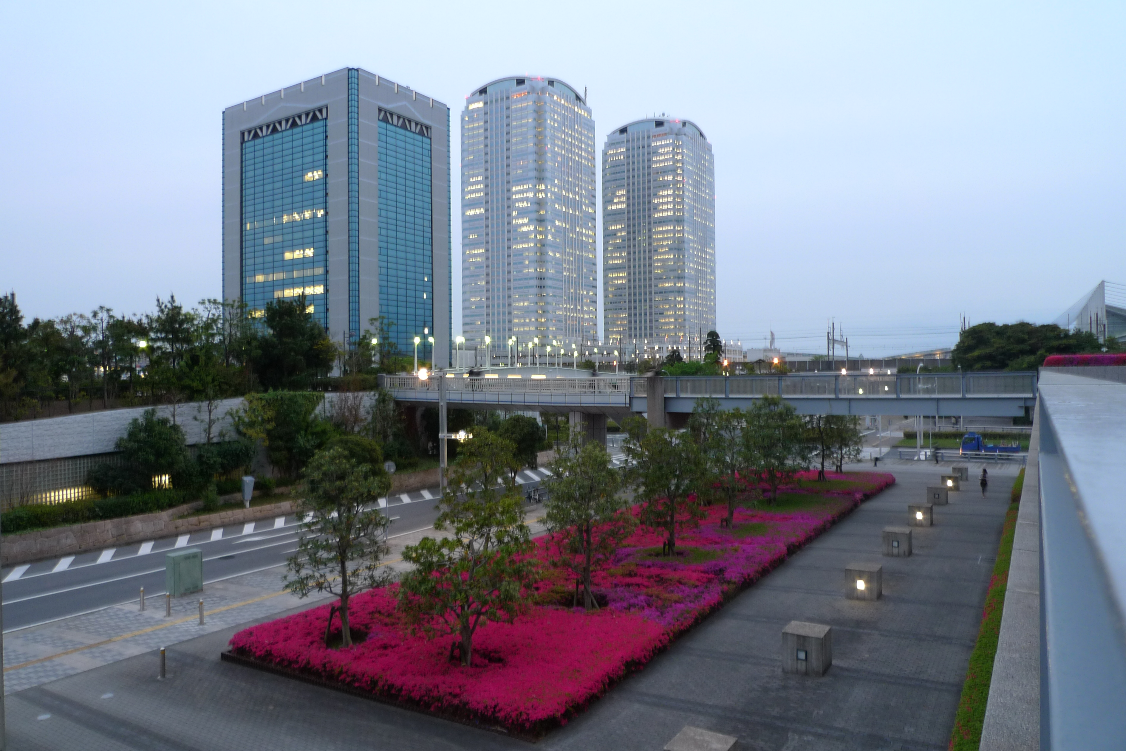 Chiba-Kaihinmakuhari